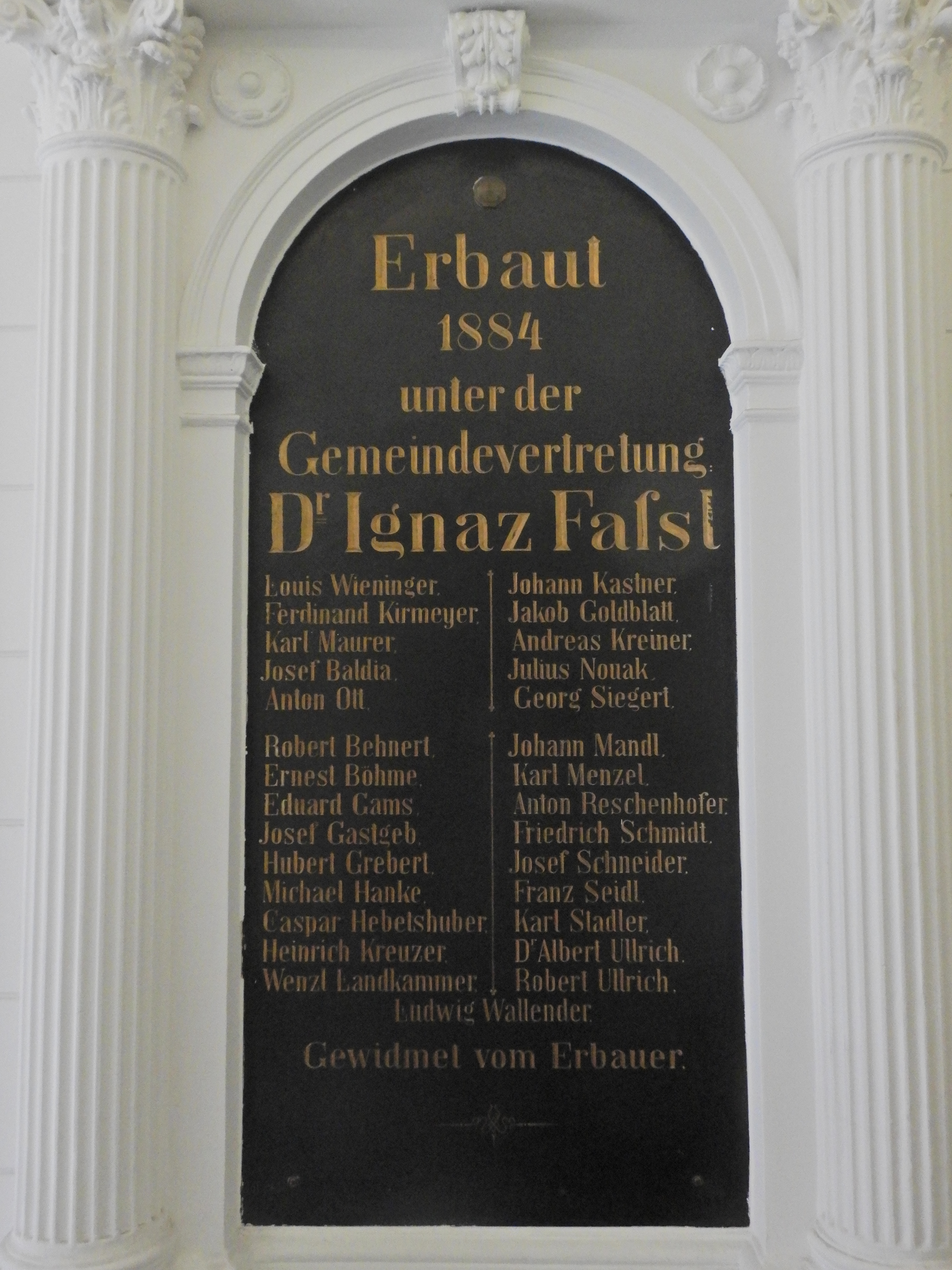 Gedenktafel für den Bau des Kronprinzessin-Stephanie-Spitals (Wien, Thaliastraße 44, Tafel 2)